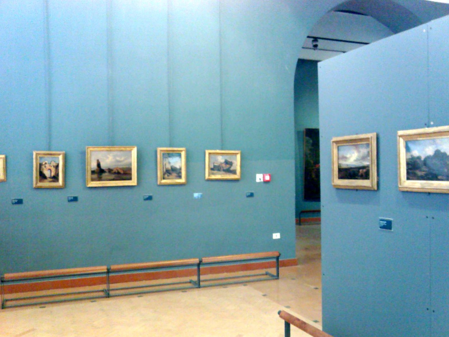 Accademia di Belle Arti di Napoli - La galleria dell'accademia, la sala Ottocento